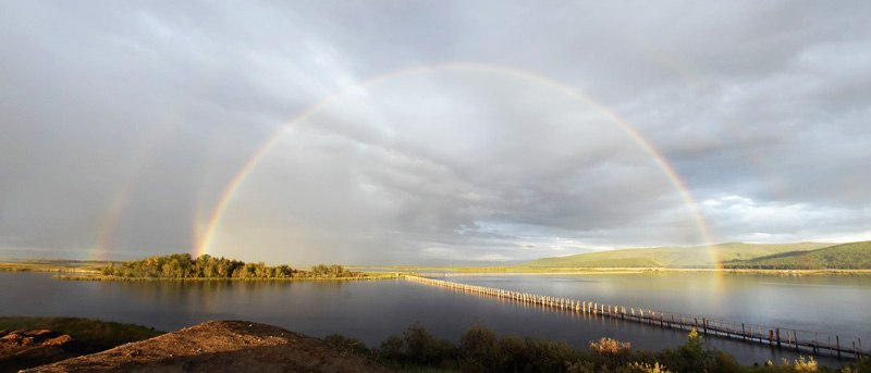 Тыва дыл: Тере-Хөлде челээш солаңгыланып тур. Тыва